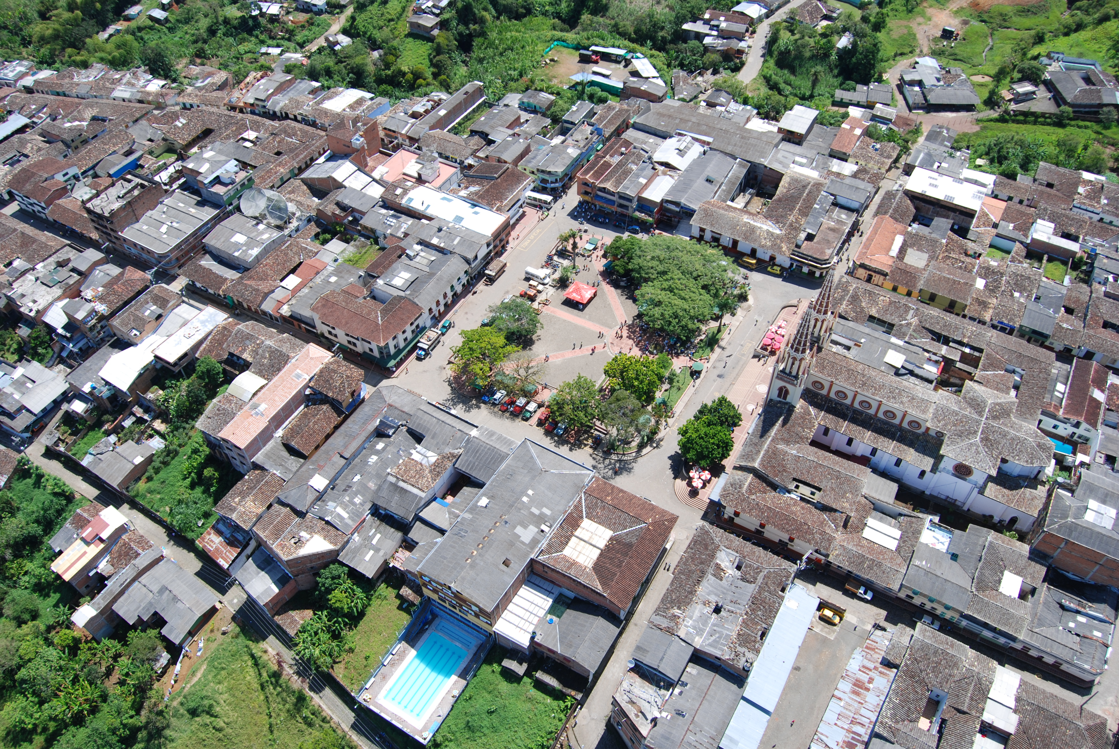 vista aerea del centro tradicional de la ciudad de frontino